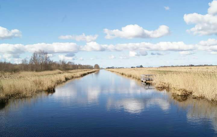 De Eernesloot ten noorden van Eernewoude, gezien vanaf het zuiden van een brug